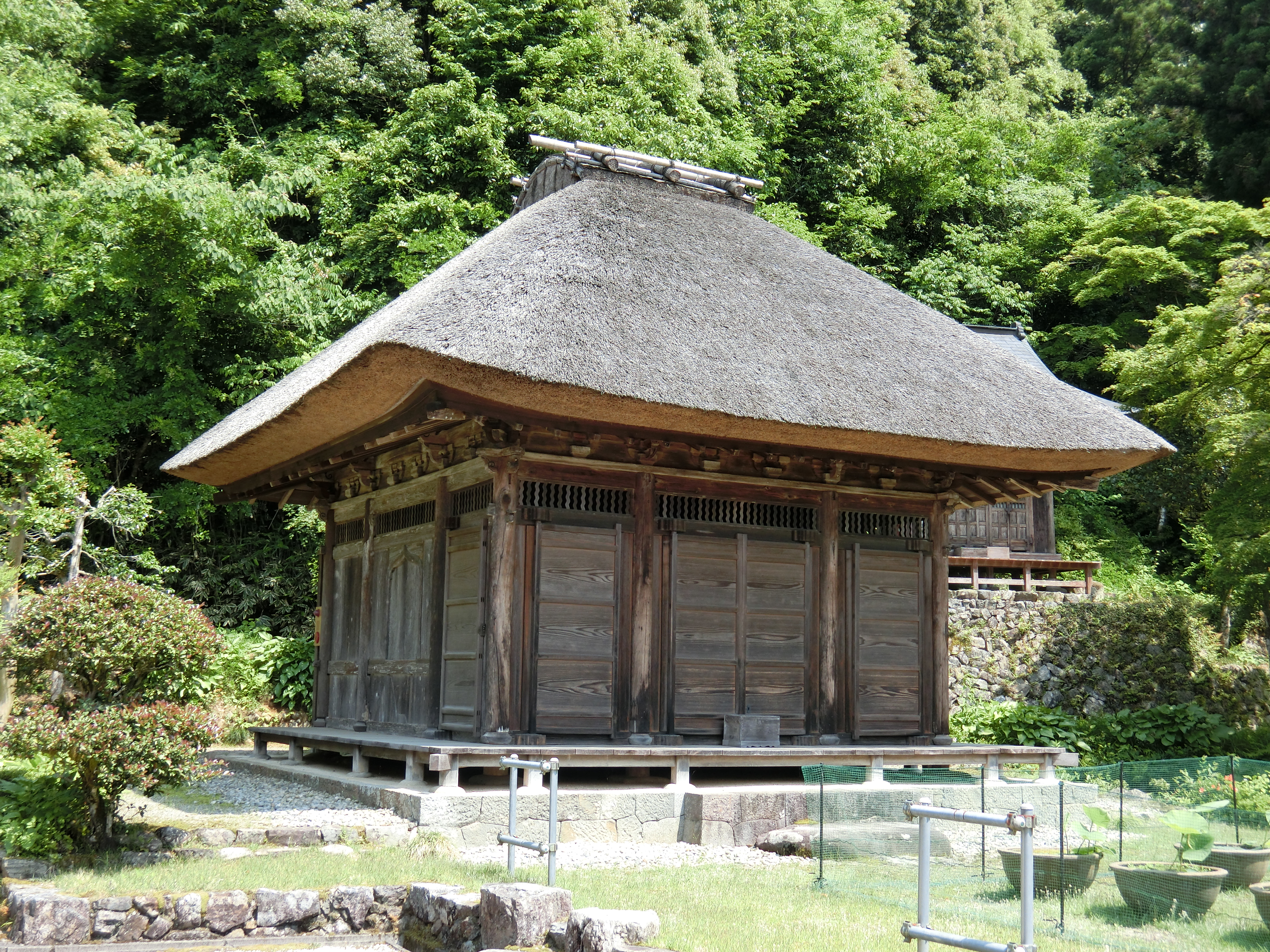 岐阜県加茂郡八百津町伊岐津志の明鏡寺観音堂。国指定重要文化財。